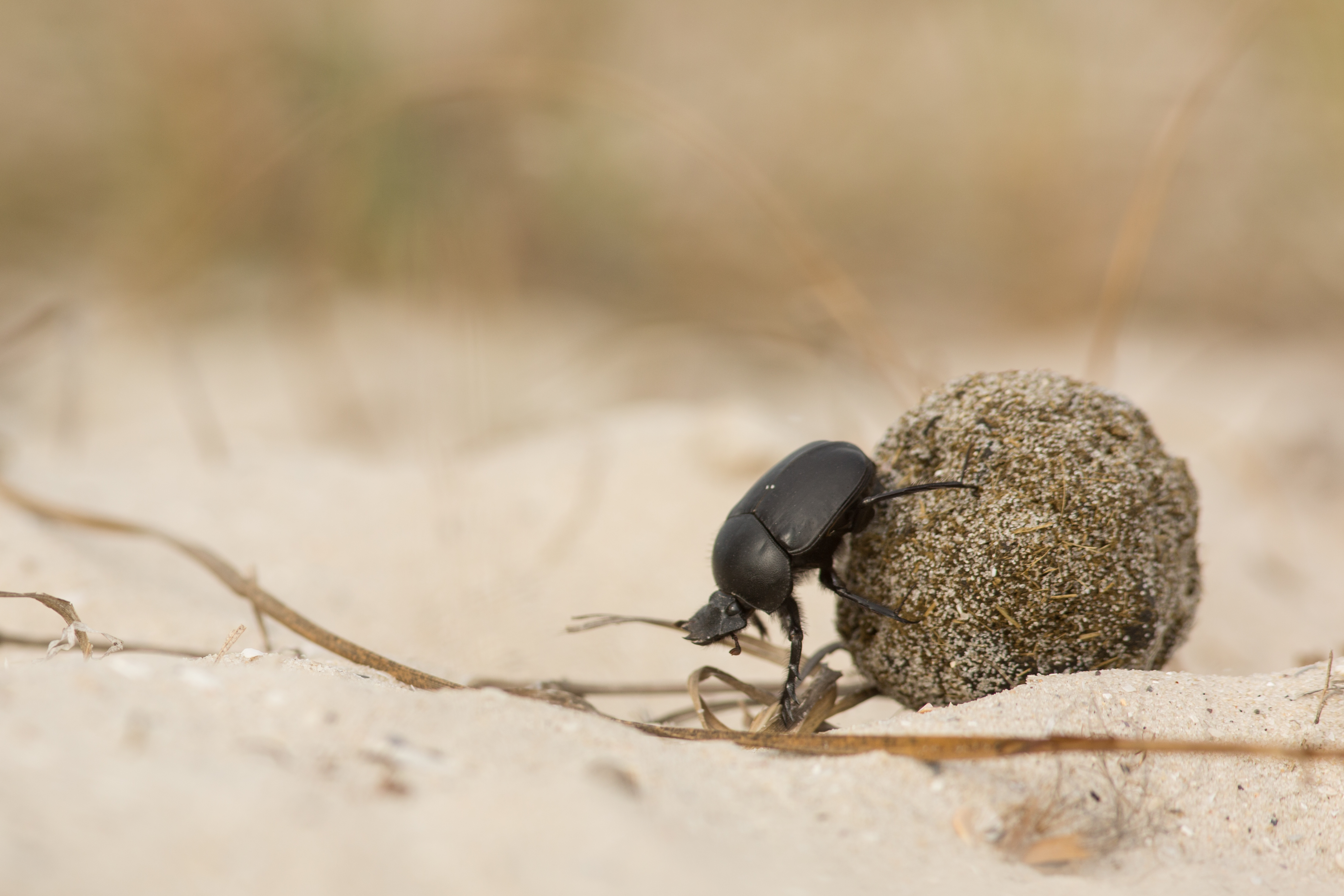 Знято під час експедиції на о. Джарилгач This photo/video of Dzharylhach was taken during Wikiexpedition to Dzharylhach supported by Wikimedia Ukraine. You can see all photographs in category Category:Wikiexpedition to Dzharylhach. English | українська | +/−